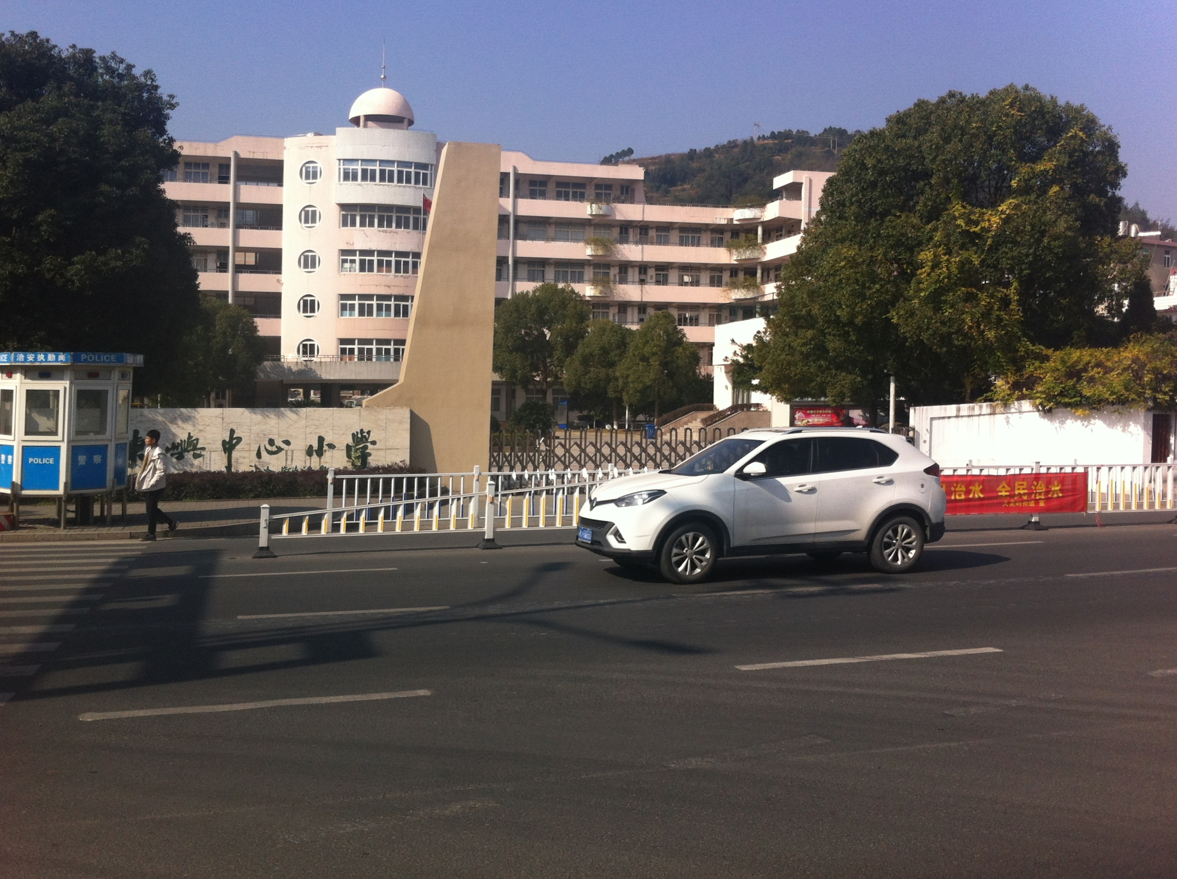 中文（中国大陆）: 玉环市陈屿中心小学